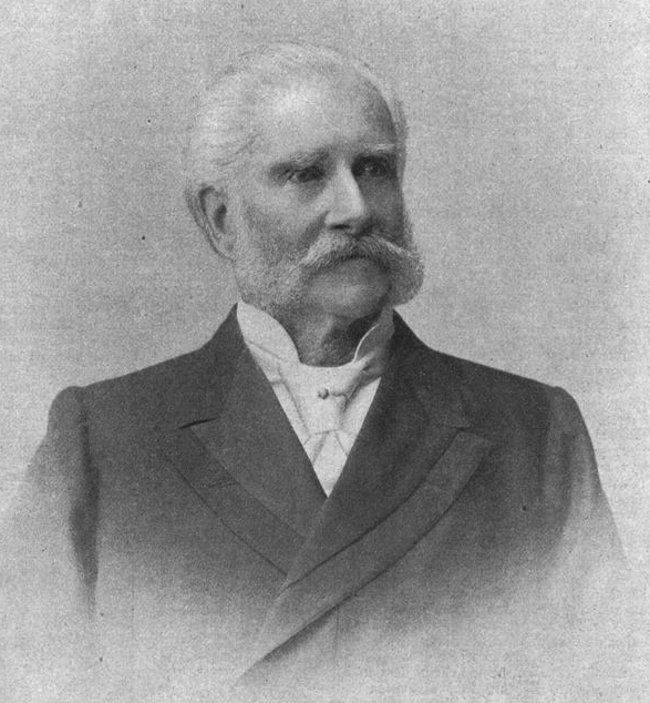 Edward_Liljewalch (1833-1915)